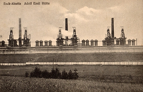 Eng Postkaart vun der Adolf-Emil-Hütte.